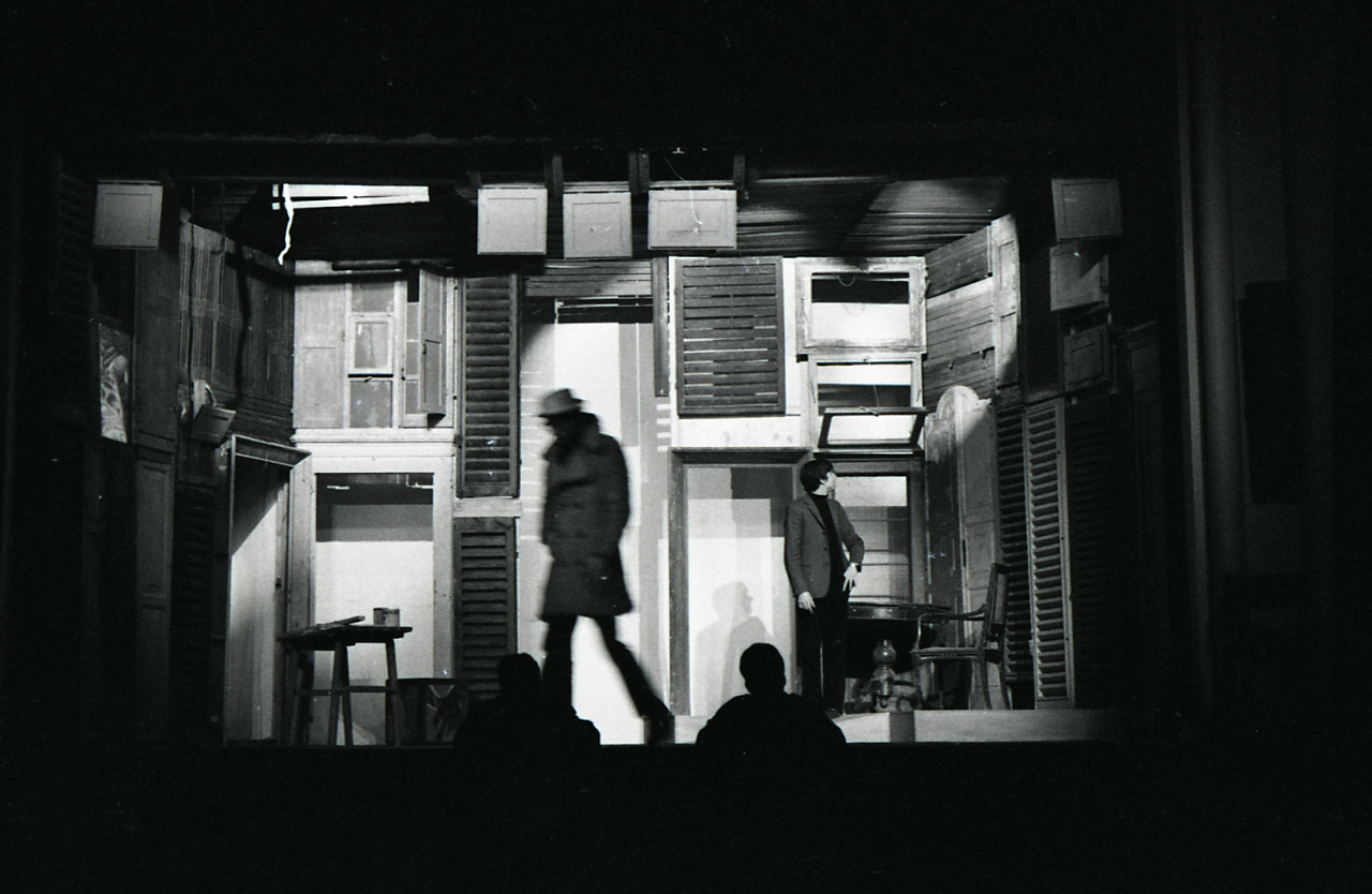 Servizio fotografico : Bologna, 1982 / Paolo Monti. - Strisce: 4, Fotogrammi complessivi: 20 : Negativo b/n, gelatina bromuro d'argento/ pellicola ; 35 mm. - ((Sul portanegativi: [NIKMAT? Kodak Tri-X Pan].